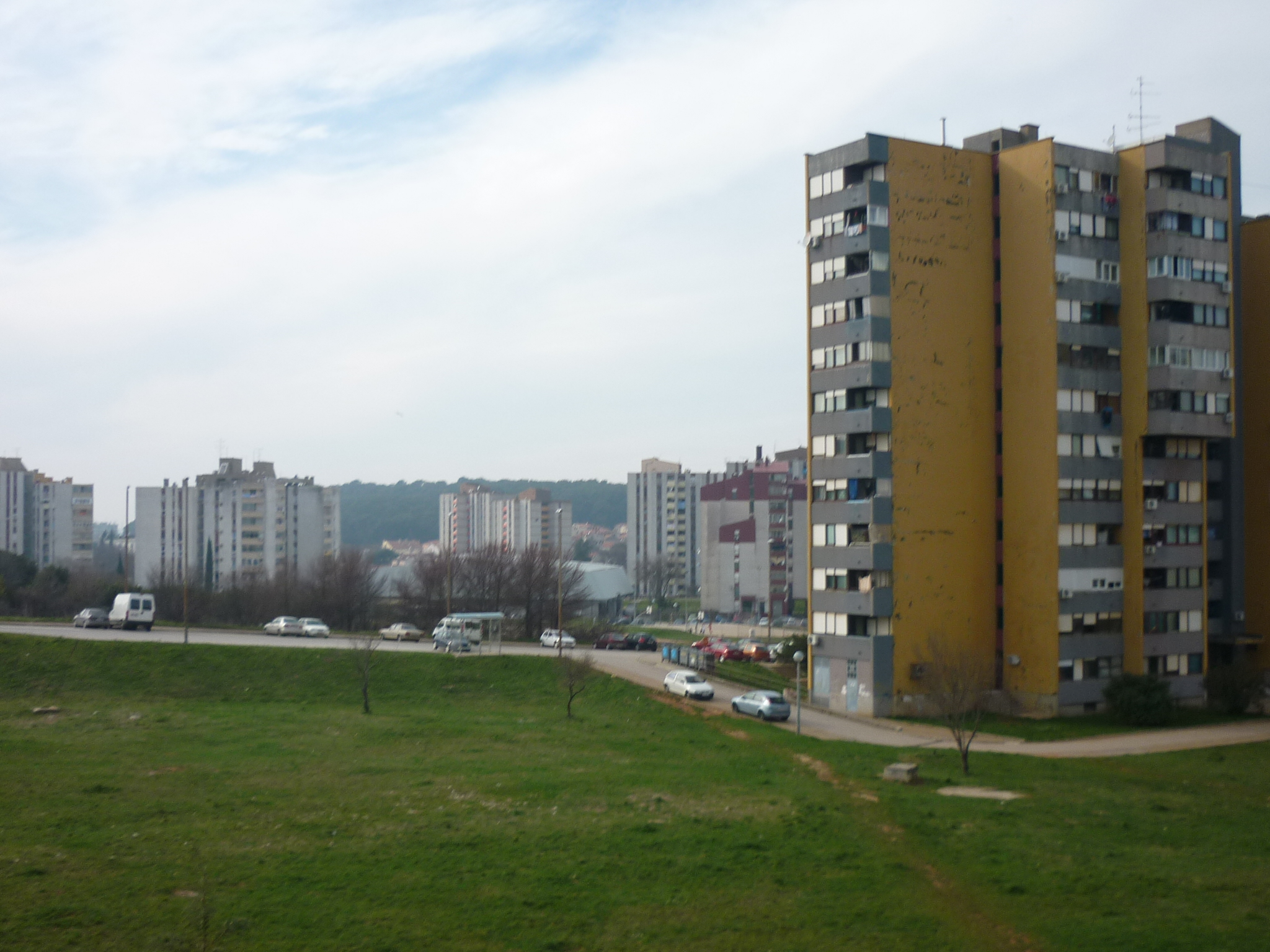 Pogled na "plave" i "bijele" zgrade, kvart Šijana, Pula.